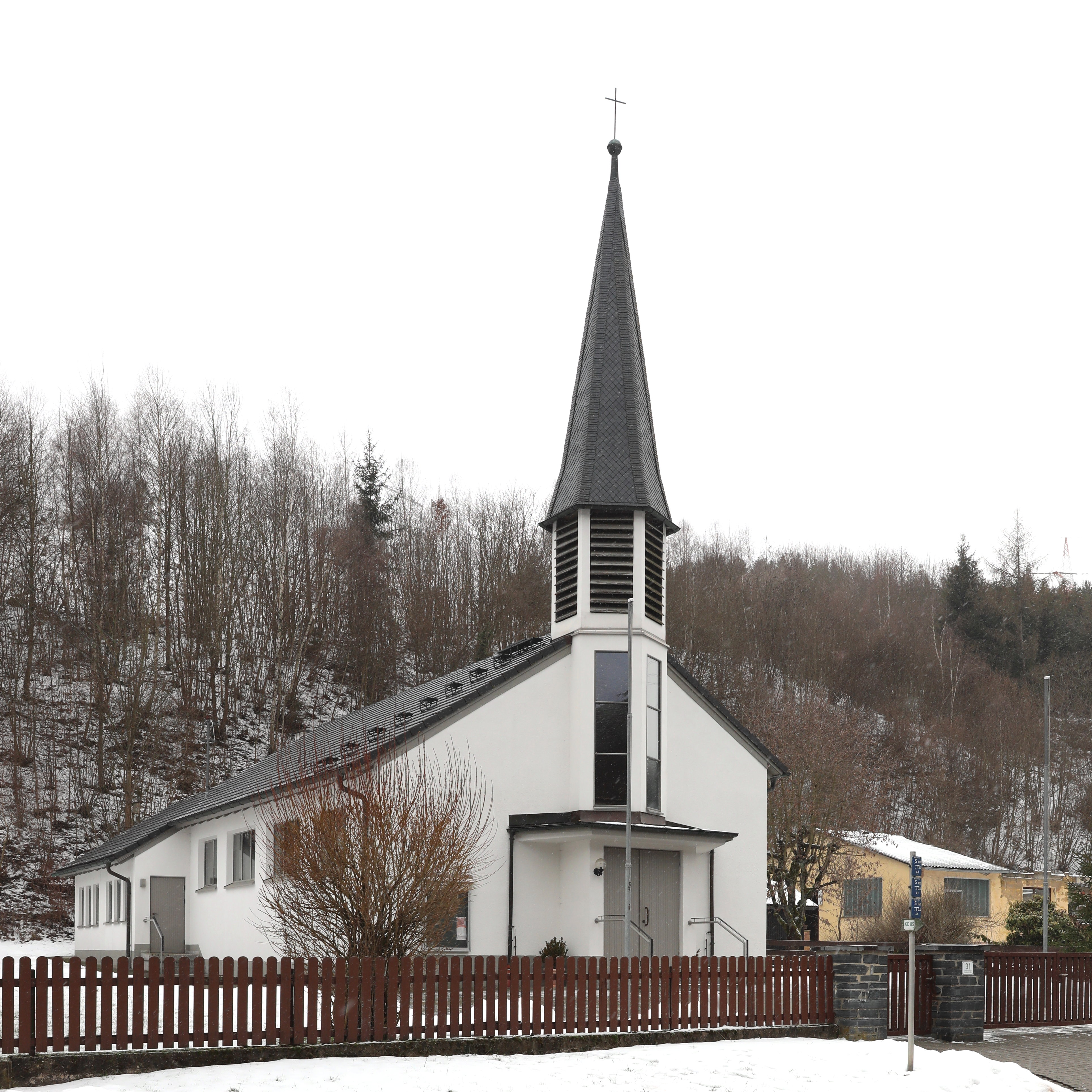 kath. Filialkirche St. Josef, Gifting